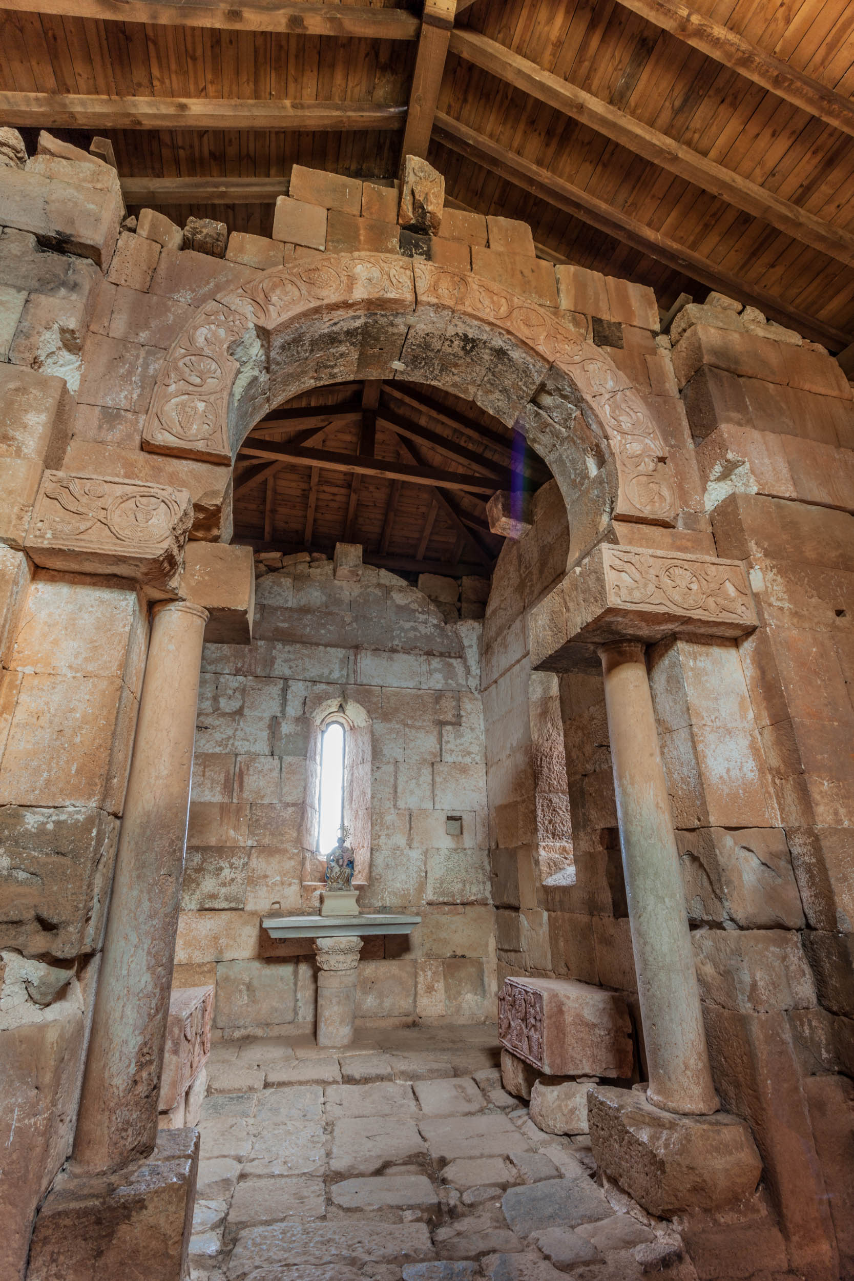 Santa María. Quintanilla de las Viñas. Arco triunfal, lado de la nave, y vista del ábside.